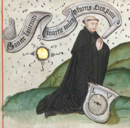 Laurentius Autenrieth, später Abt des Benediktinerklosters Lorch, im Lorcher Graduale WLB Stuttgart Cod. mus. I fol. 65, Bl. 218r